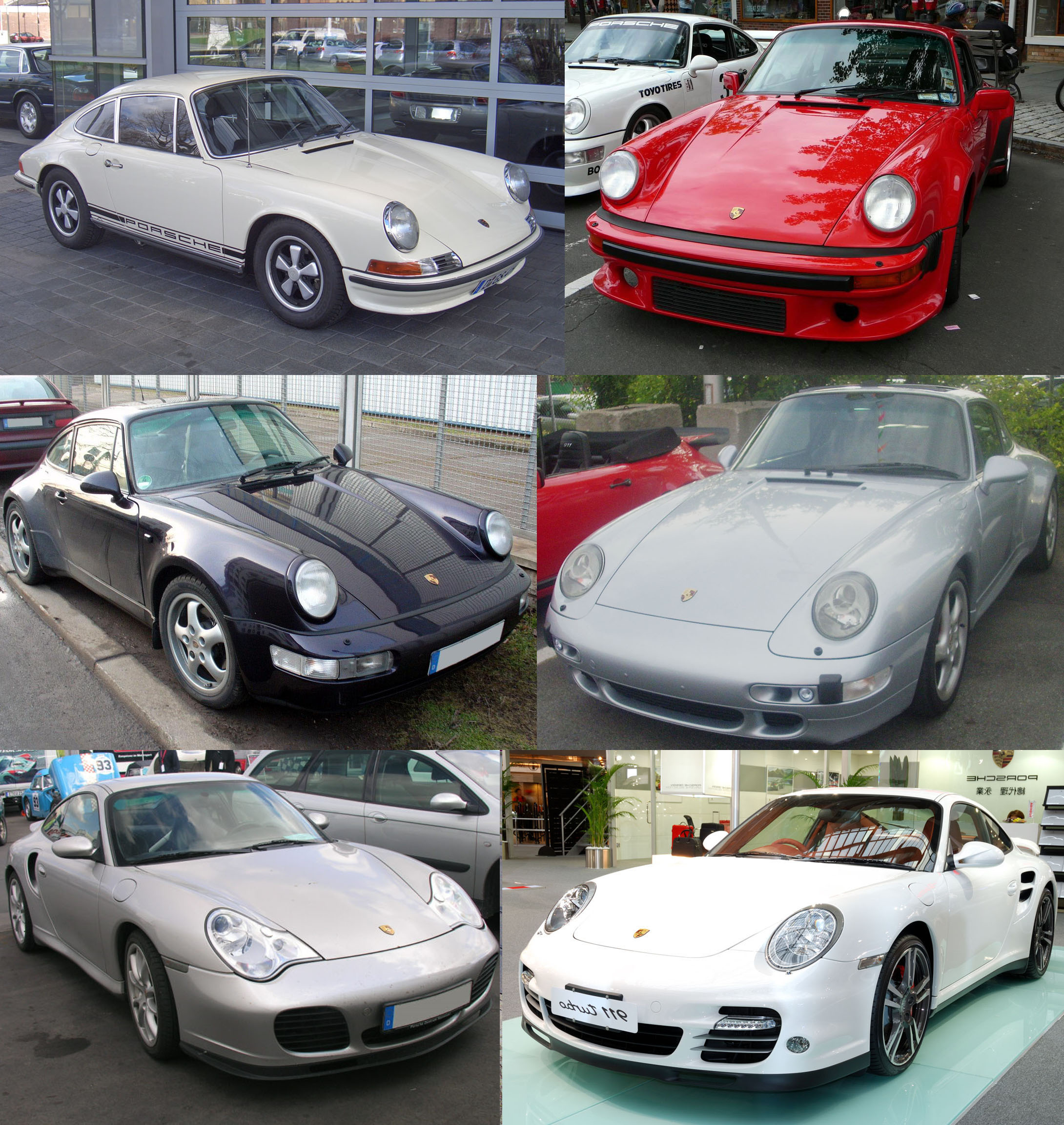 Porsche 996 Turbo